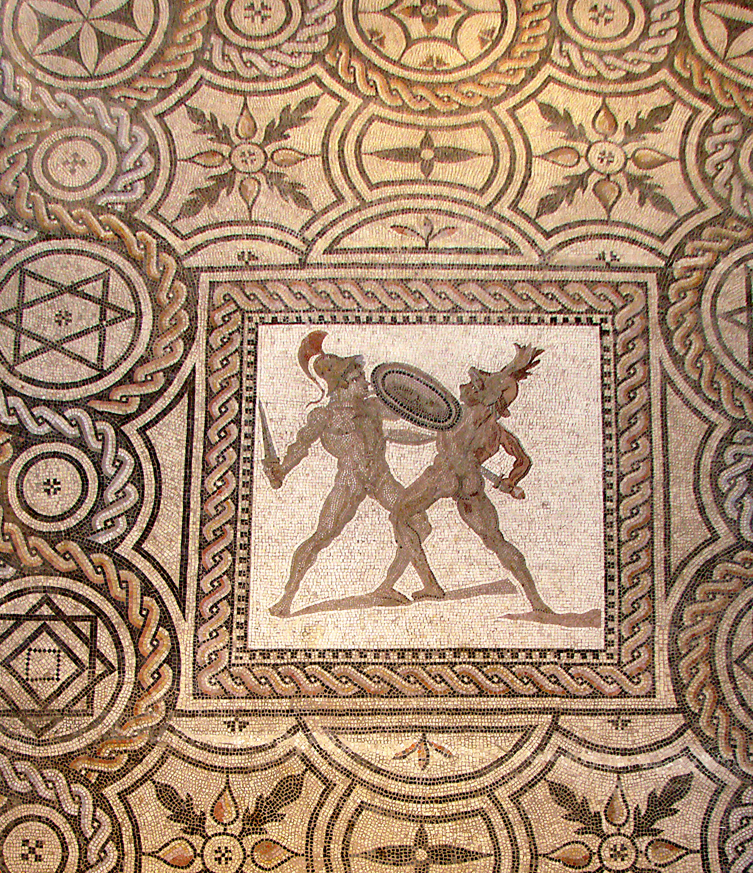 Mosaïque dite des deux gladiateurs (détail), 2ème siècle +JC, trouvée à Reims, rue Perseval, en 1890. Musée Saint-Remi à Reims.